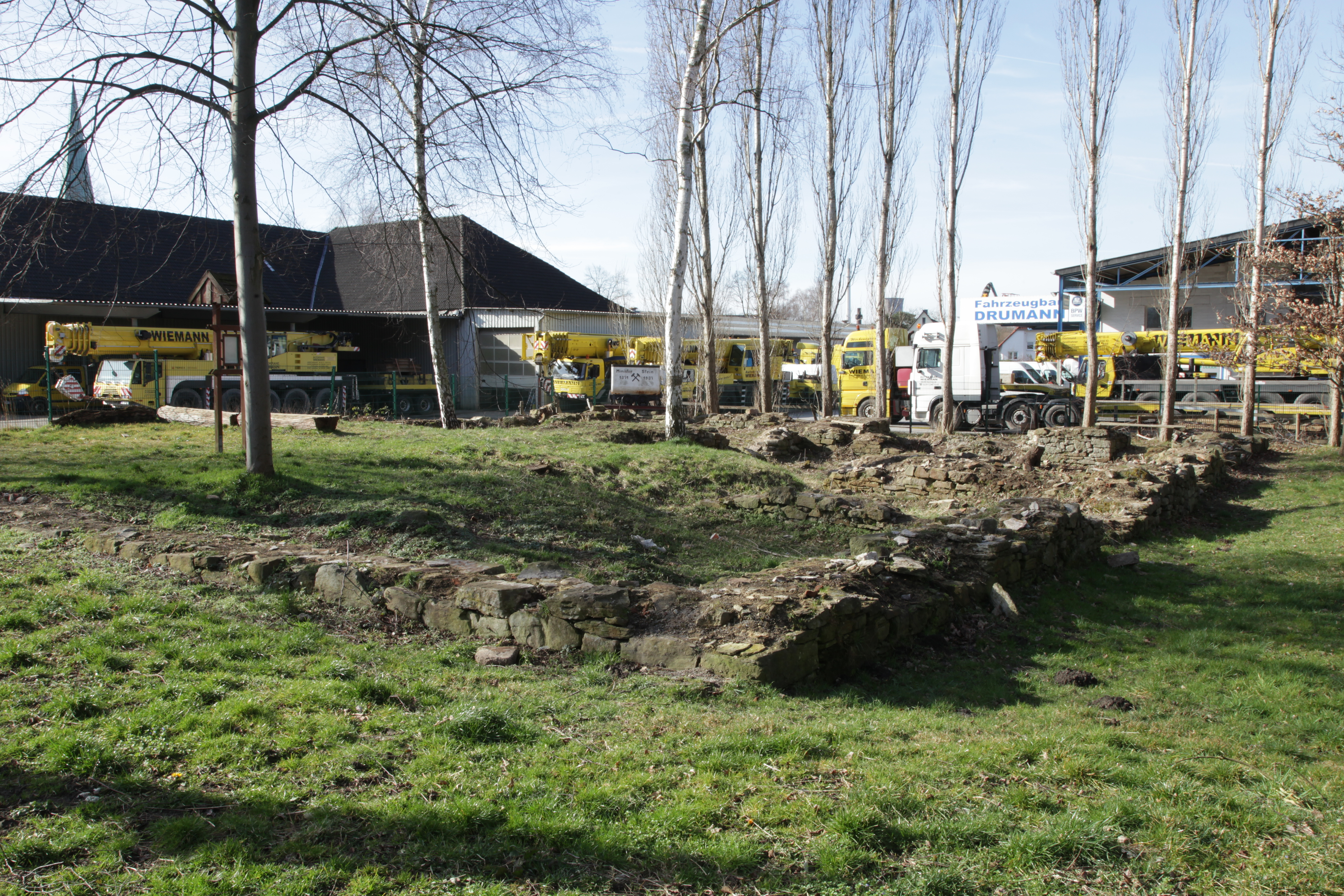 Ruinen von Haus Mengede, Waltroper Straße in Dortmund-Mengede